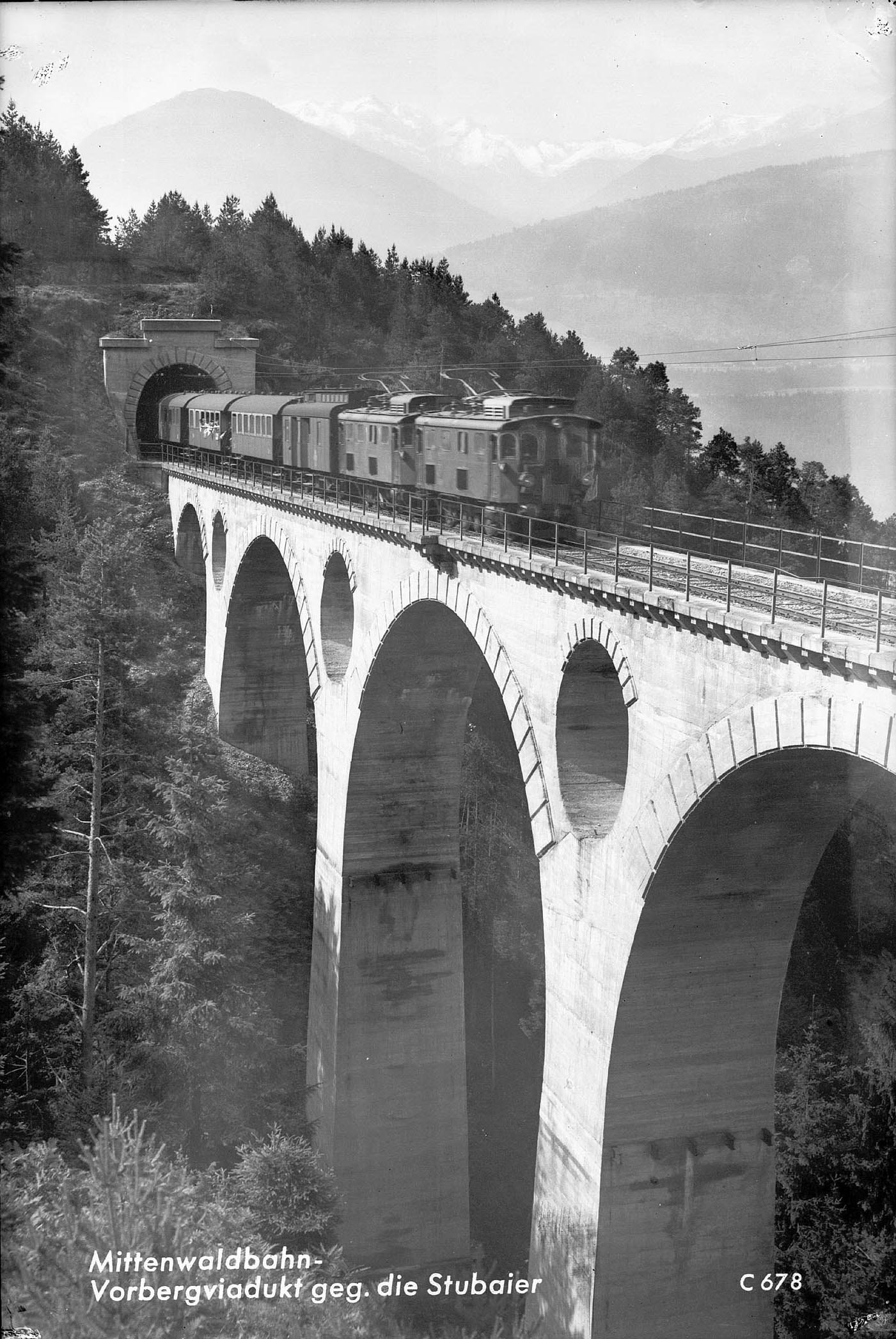 Mittenwaldbahn - Vorbergviadukt gegen Stubaier